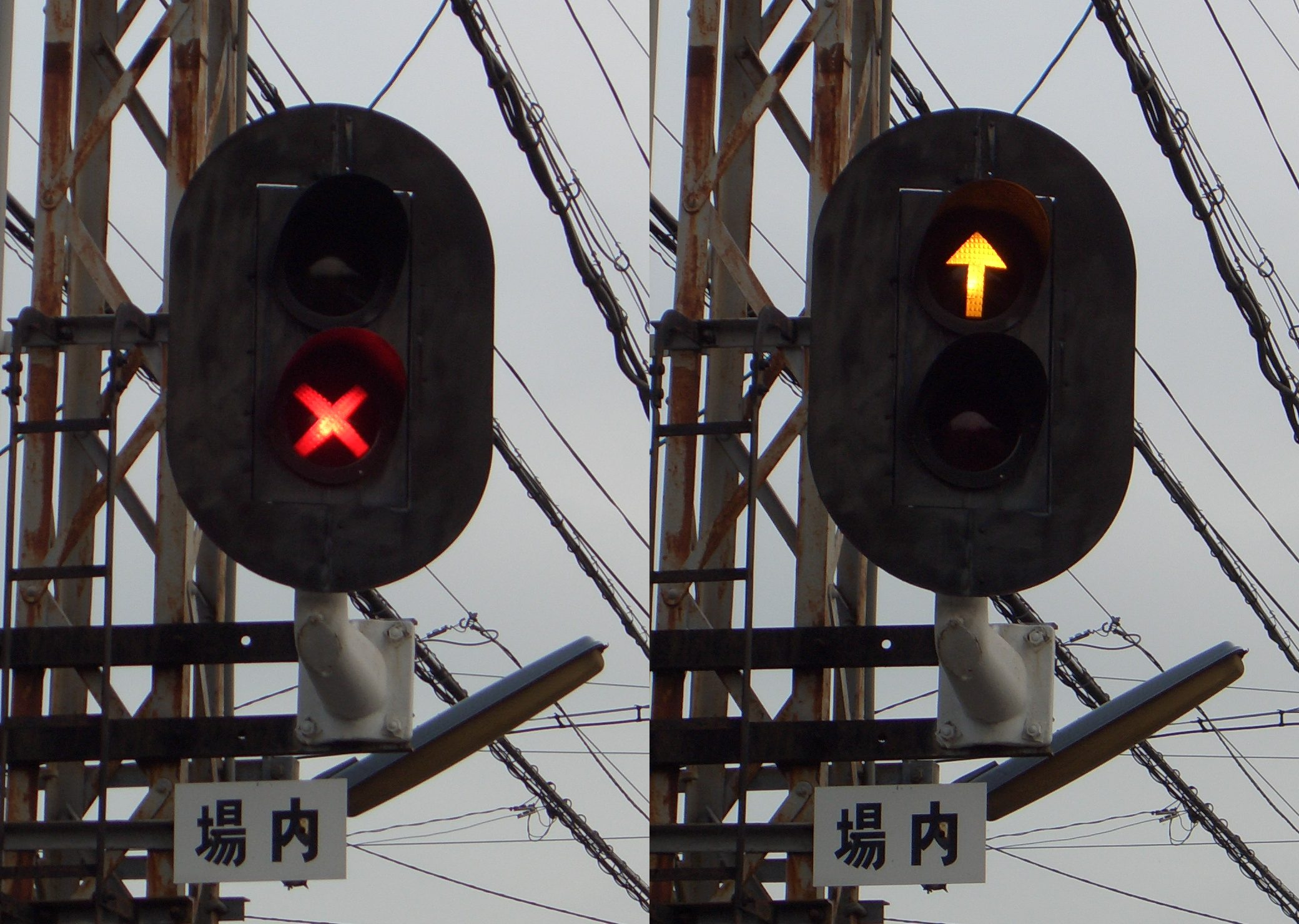 阪堺電気軌道阪堺線浜寺駅前停留場の場内信号機